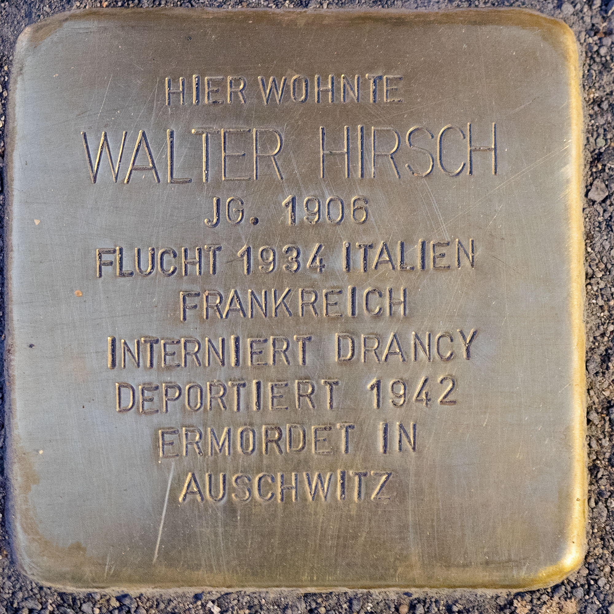 2016 11 25 Stolpersteine Kempen Hirsch Walter